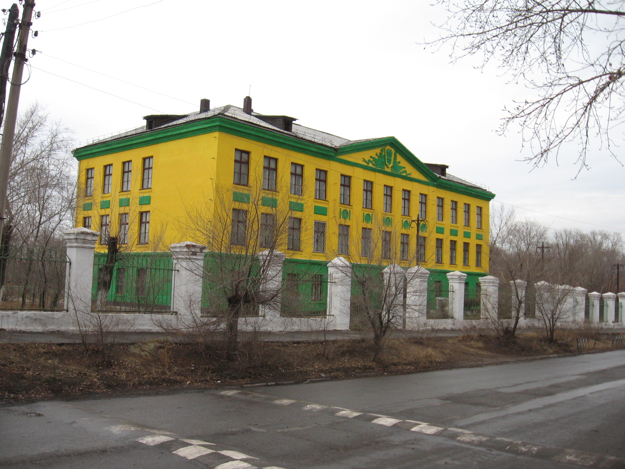 Школа 4